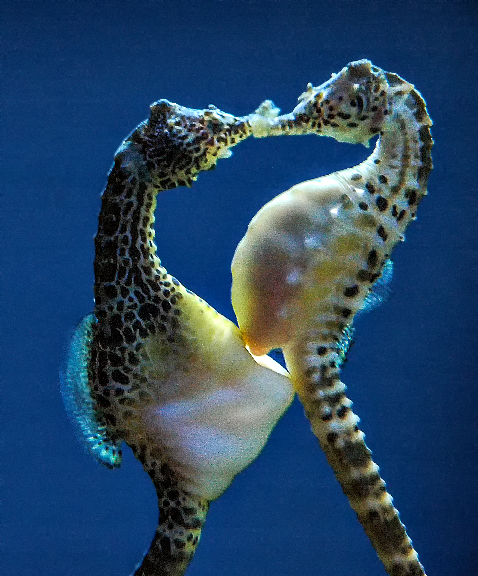 Hippocampus abdominalis, apareamiento. Monterey Bay Aquarium, California, Estados unidos